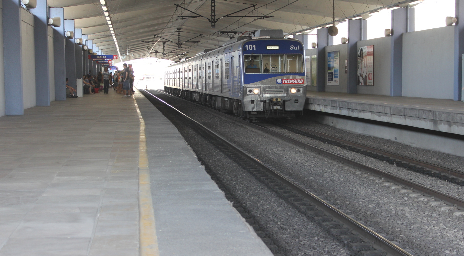 Metrô de Porto Alegre